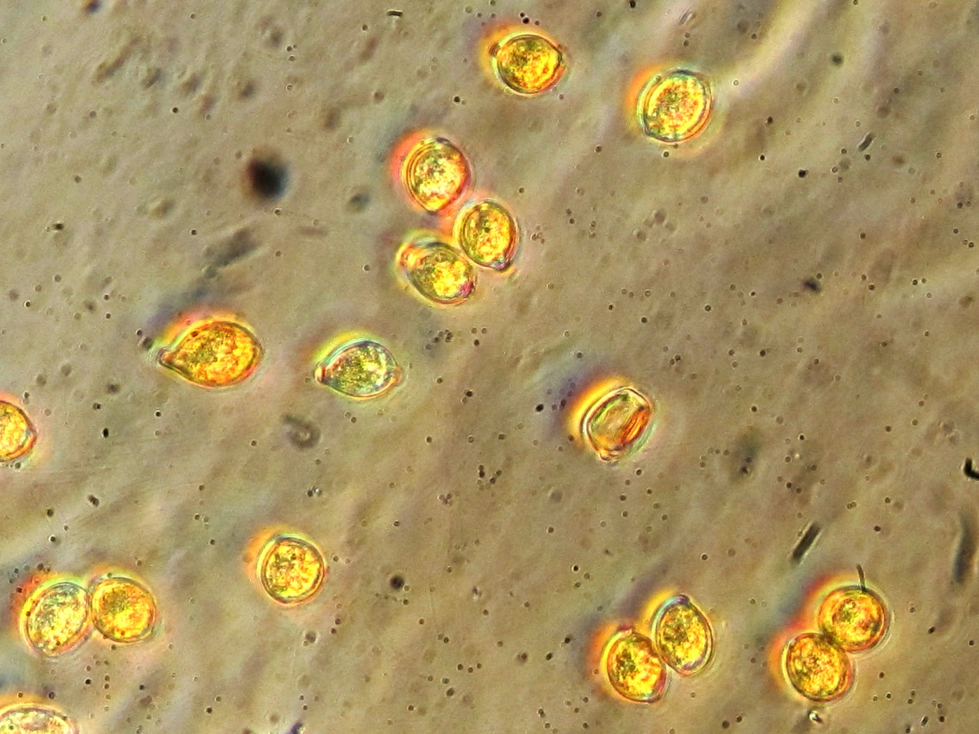 Botryobasidium aureum Parmasto: Spores